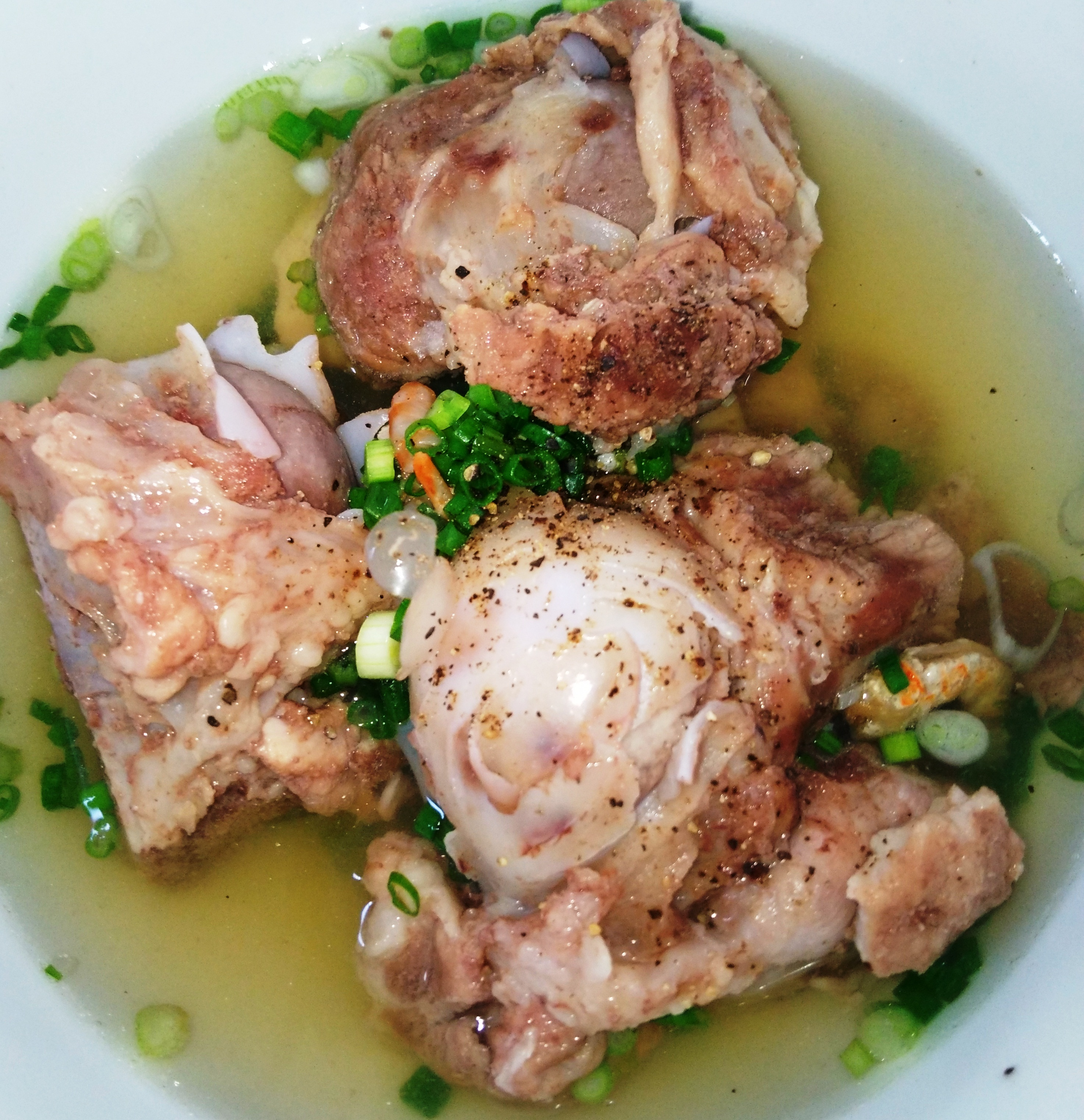 Hủ tíu Nam Vang (xí quách), quán Cầu Trắng, Kênh nước đen, Bình Tân